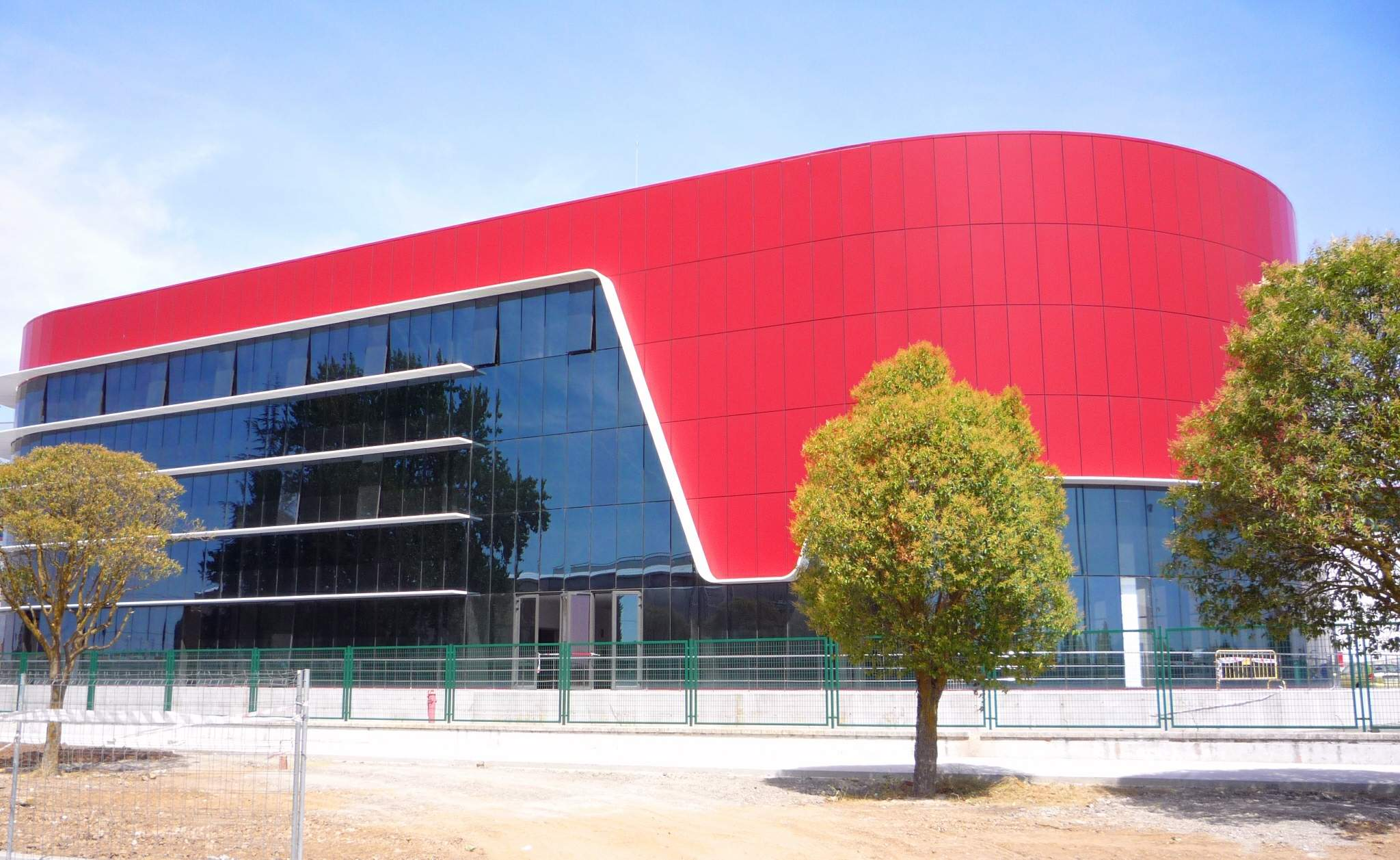 La nueva fábrica de Campofrío en Burgos, terminada de construir en 2016 tras la destrucción de la anterior planta en el pavoroso incendio de 2014